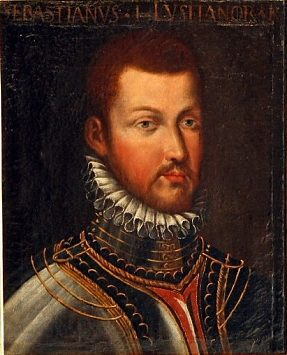 Retrato d’El Rei Dom Sebastião. Pintura a óleo sobre tela datável dos finais do Século XVII ou mais provavelmente já do século XVIII, patente na galeria Câmara dos Azuis. Autor anónimo, muito provavelmente Português, ou possivelmente Italiano ou Espanhol.